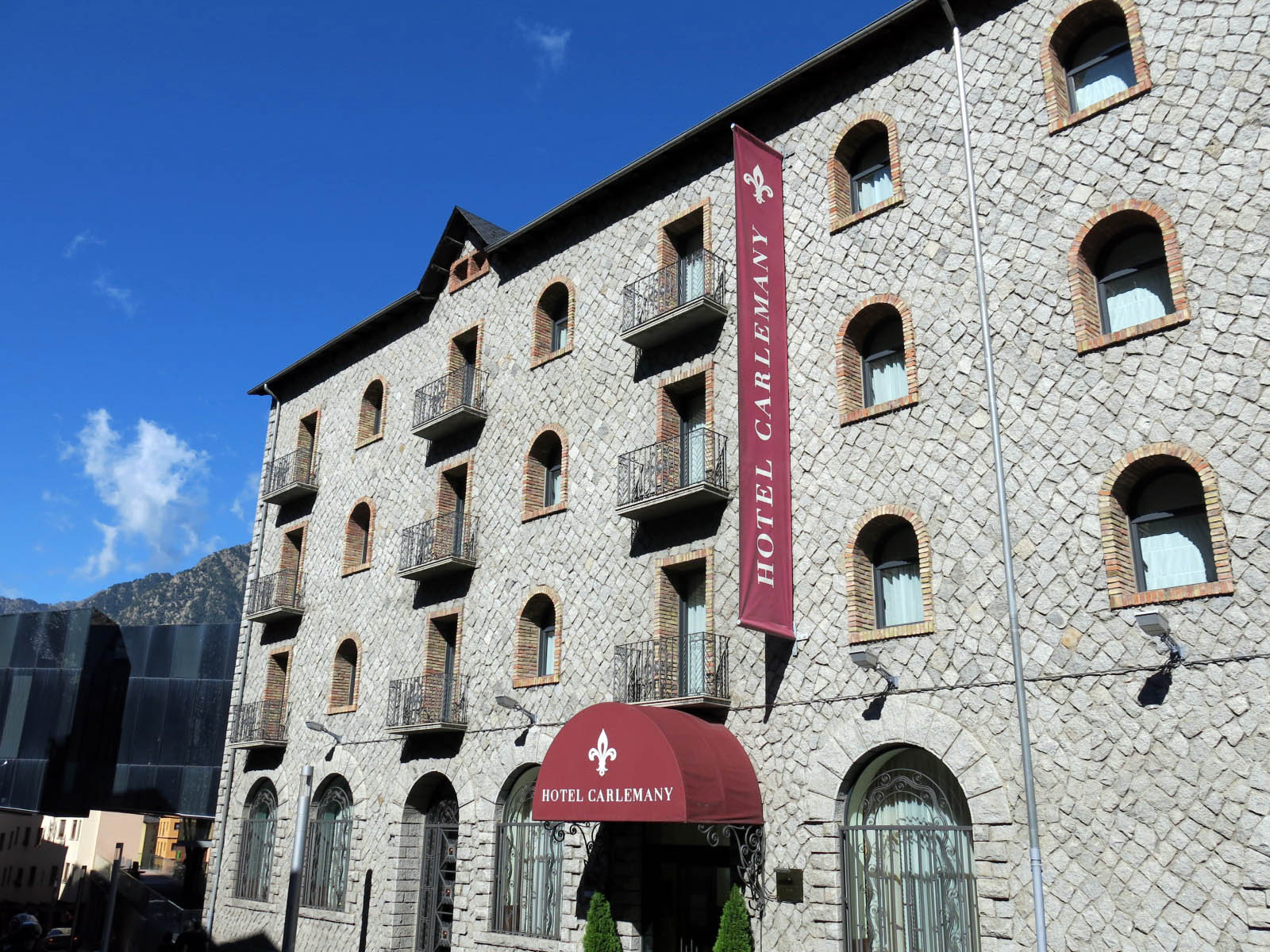 Hotel Carlemany (Escaldes-Engordany)